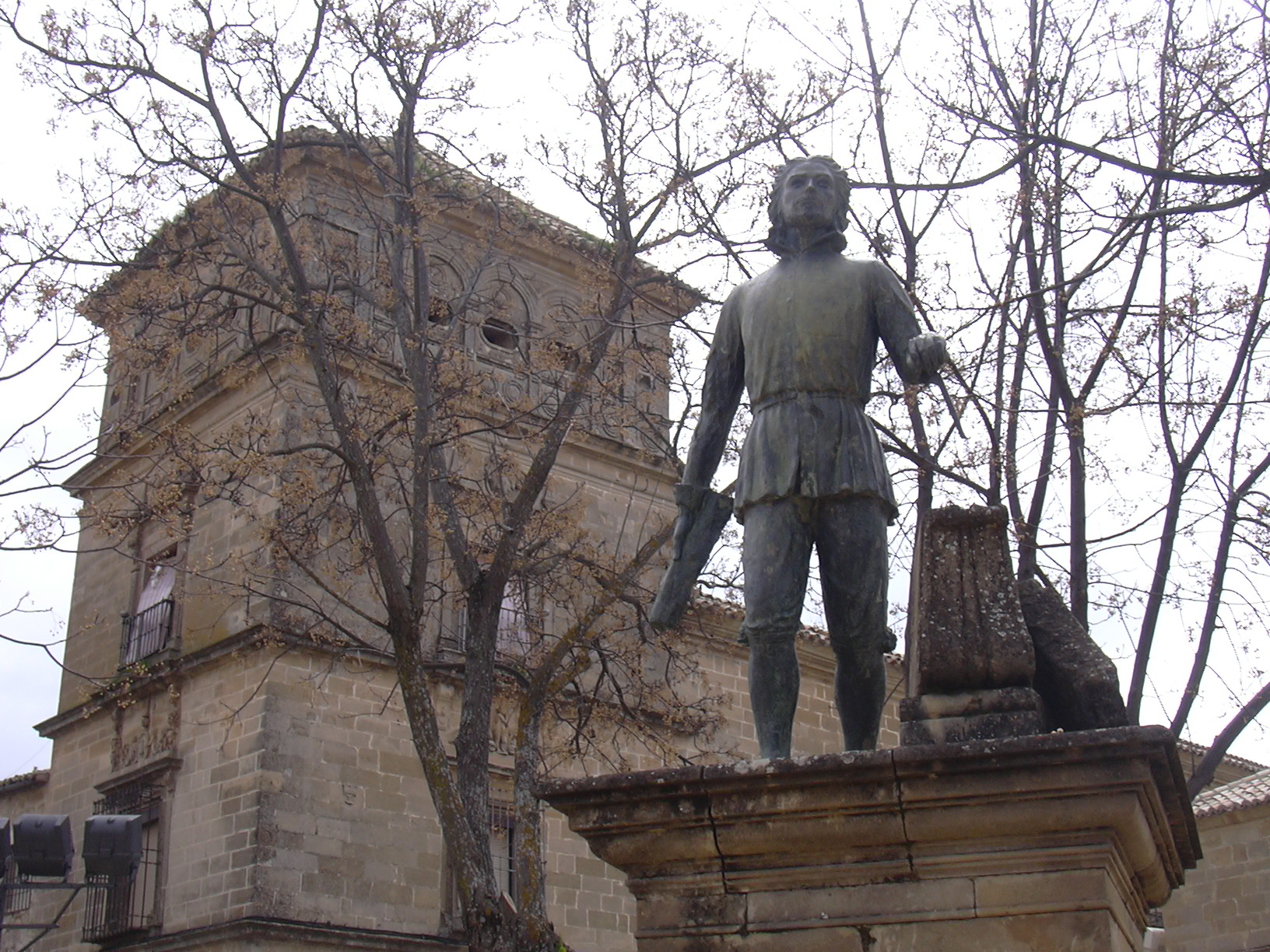 Estatua en bronce del escultor renacentista Andrés de Vandelvira, situada en la Plaza Vázquez de Molina de Úbeda. La ciudad de Úbeda levantó esta estatua como muestra de agradecimiento a sus numerosas obras arquitectónicas en la ciudad que la han llevado a ser Patrimonio de la Humanidad en 2003.